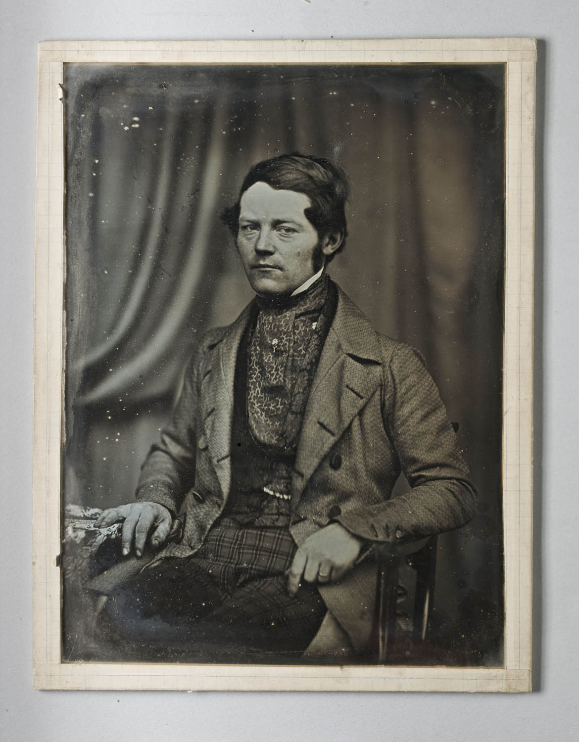 Depicted person: Johan Wilhelm Bergström, Fotograf